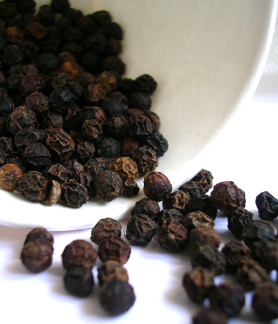 ഉണക്കിയ കുരുമുളക്.